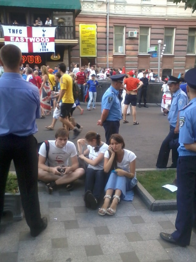 Міліція заблокувала активістів під час роздачі листівок і журналів на вул. Рогнідинській у день проведення матчу Євро 2012 у Києві. Фото зроблене активістом ГР «Відсіч».